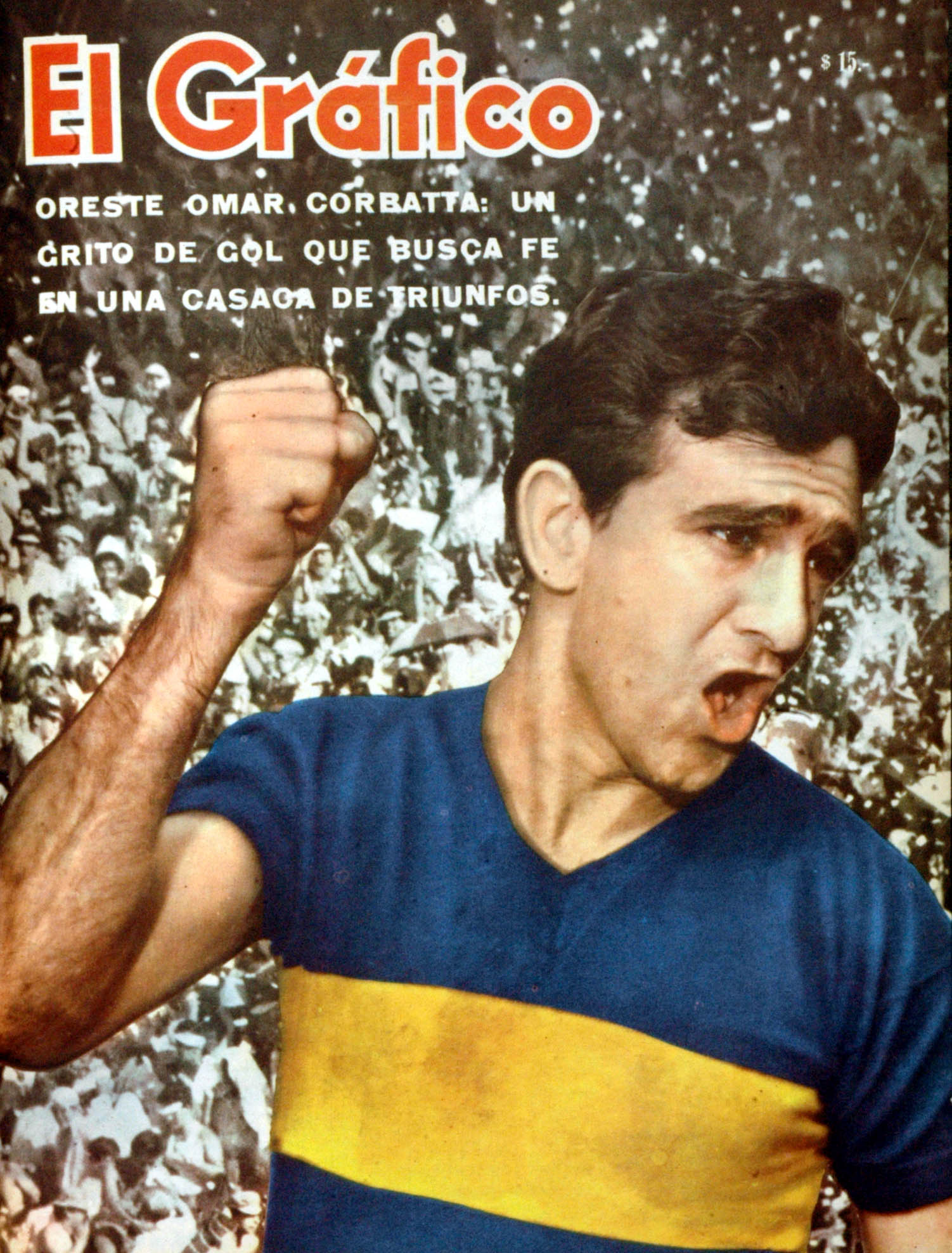 El Grafico del 27 de Febrero de 1963. Edicion 2264